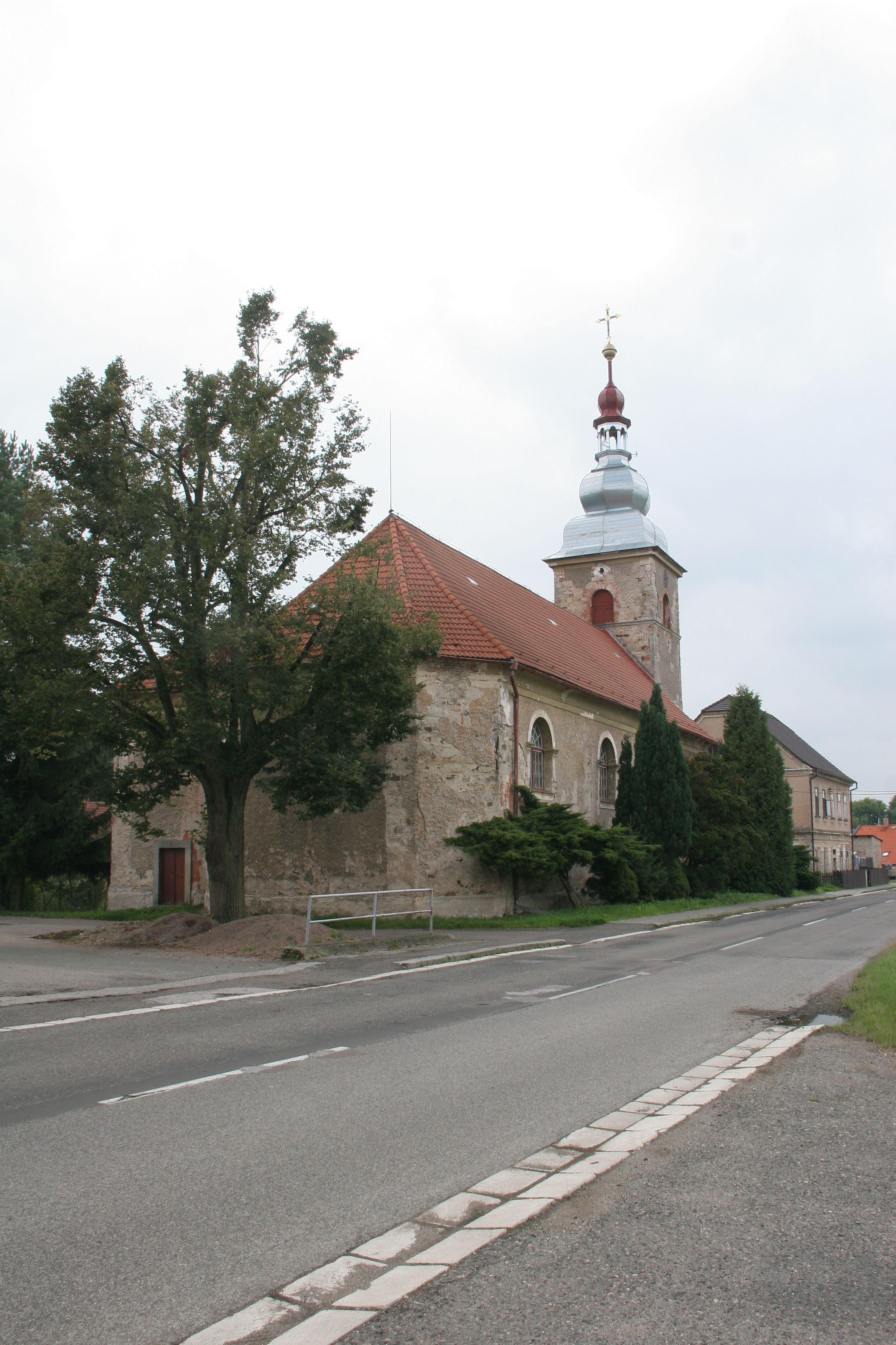 Kostel svatého Josefa, Horní Vlčkovice.